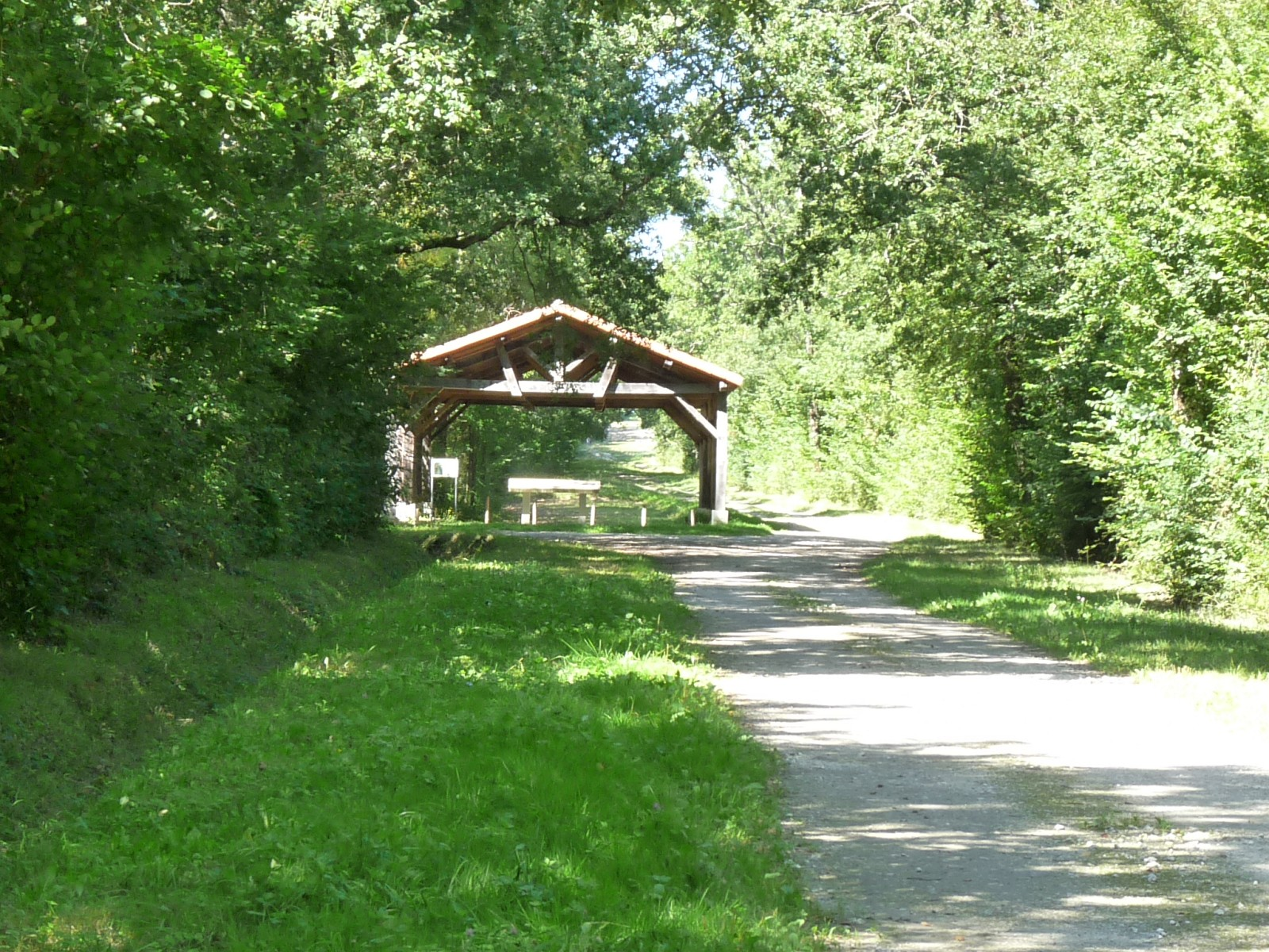 Ancienne voie romaine Saintes-Pons-Périgueux, limite Neulles-Neuillac, Charente-Maritime, France